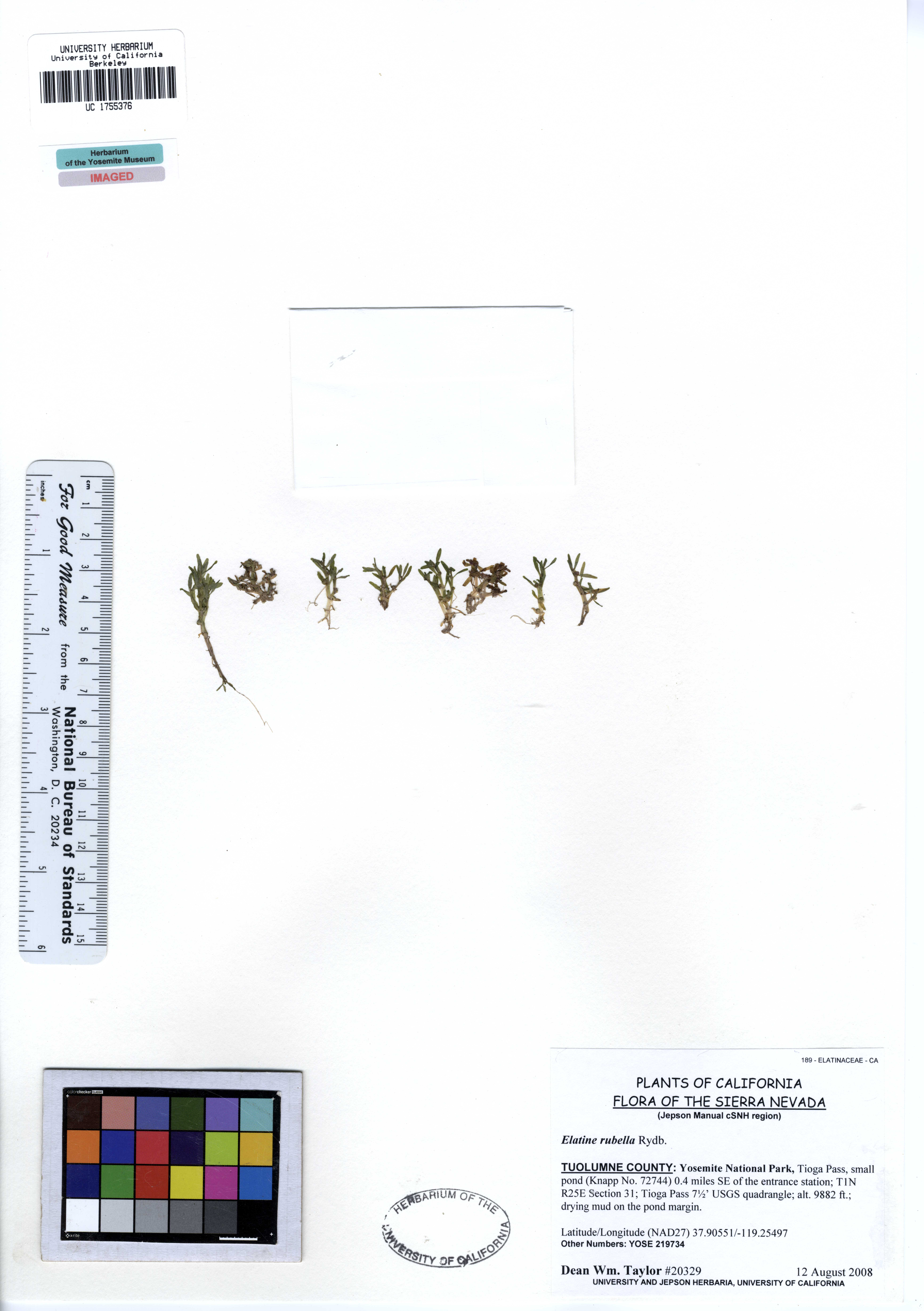 UC1755376 Elatine rubella